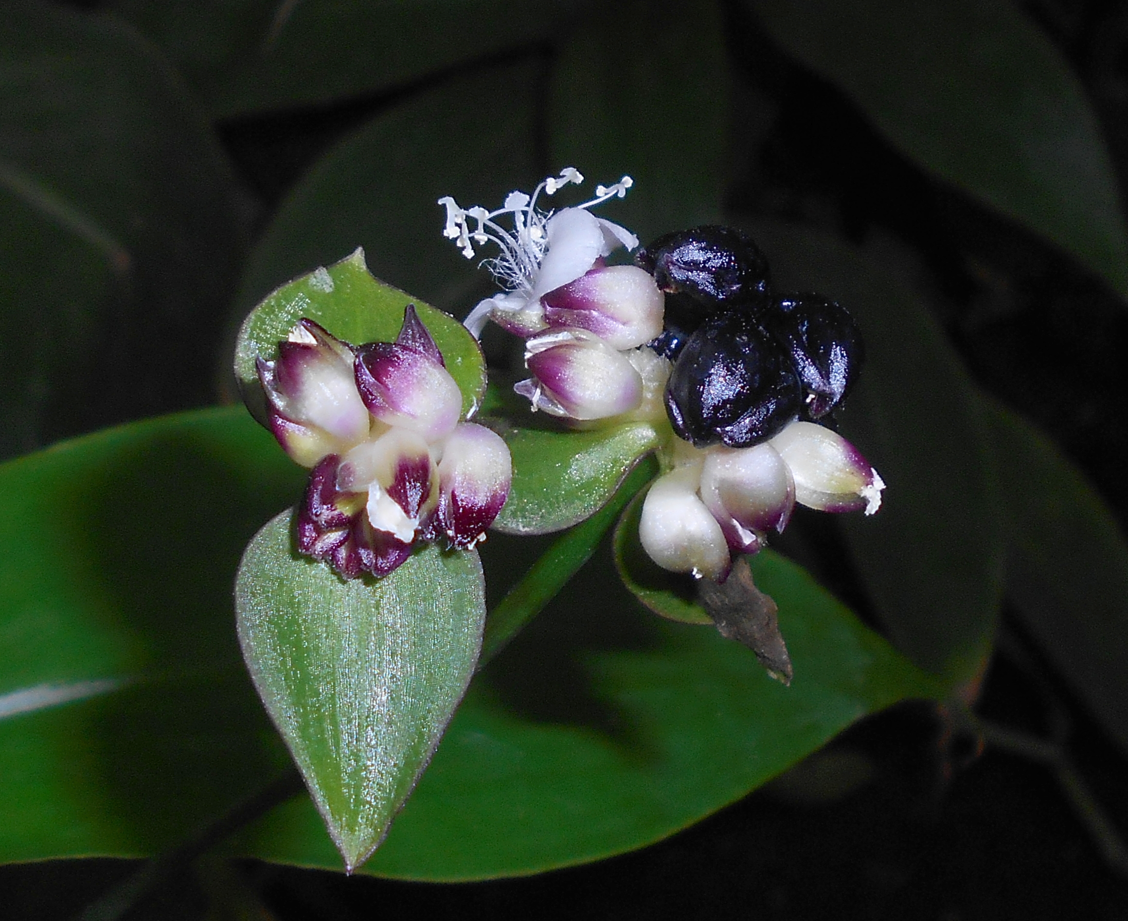 Campelia zanonia, Ogród Botaniczny UMCS w Lublinie.